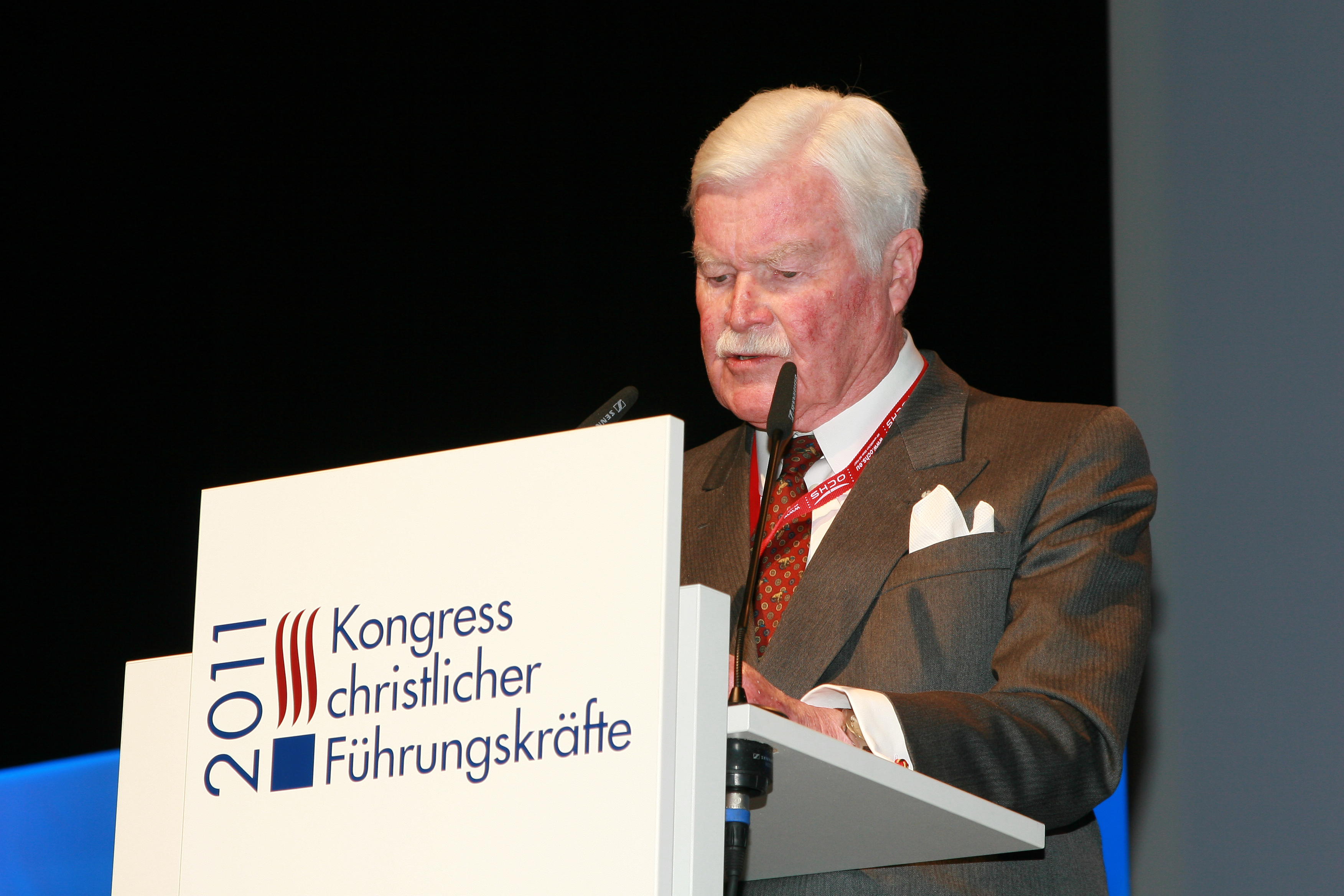 Der Unternehmer Albrecht Fürst zu Castell-Castell, auf dem Kongress christlicher Führungskräfte 2011 in Nürnberg